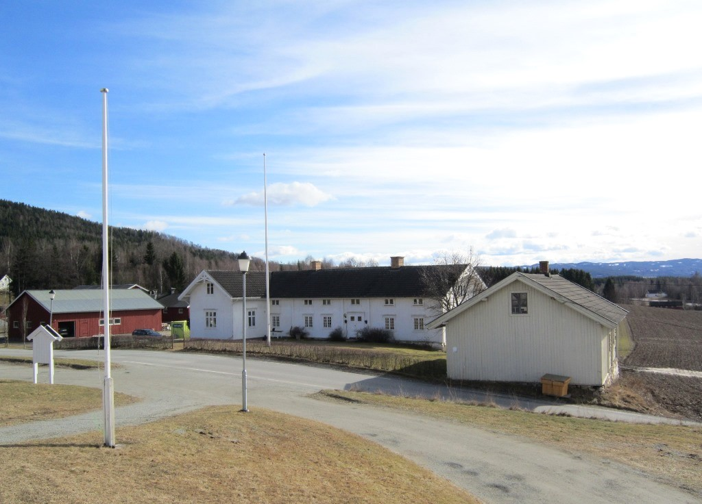 Tomter gård i Vallset med fylkesvei 1886 (tidl. 220) foran